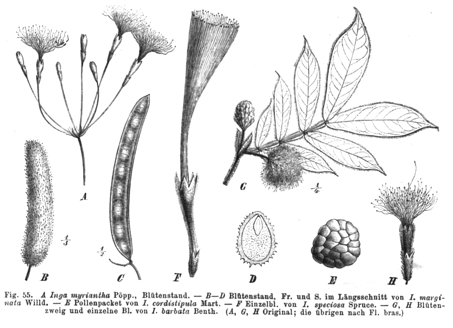 Inga umbellifera (= I. myriantha), Inga semialata (= I. marginata), Inga cordistipula, Inga amazonica (= I. speciosa), Inga barbata